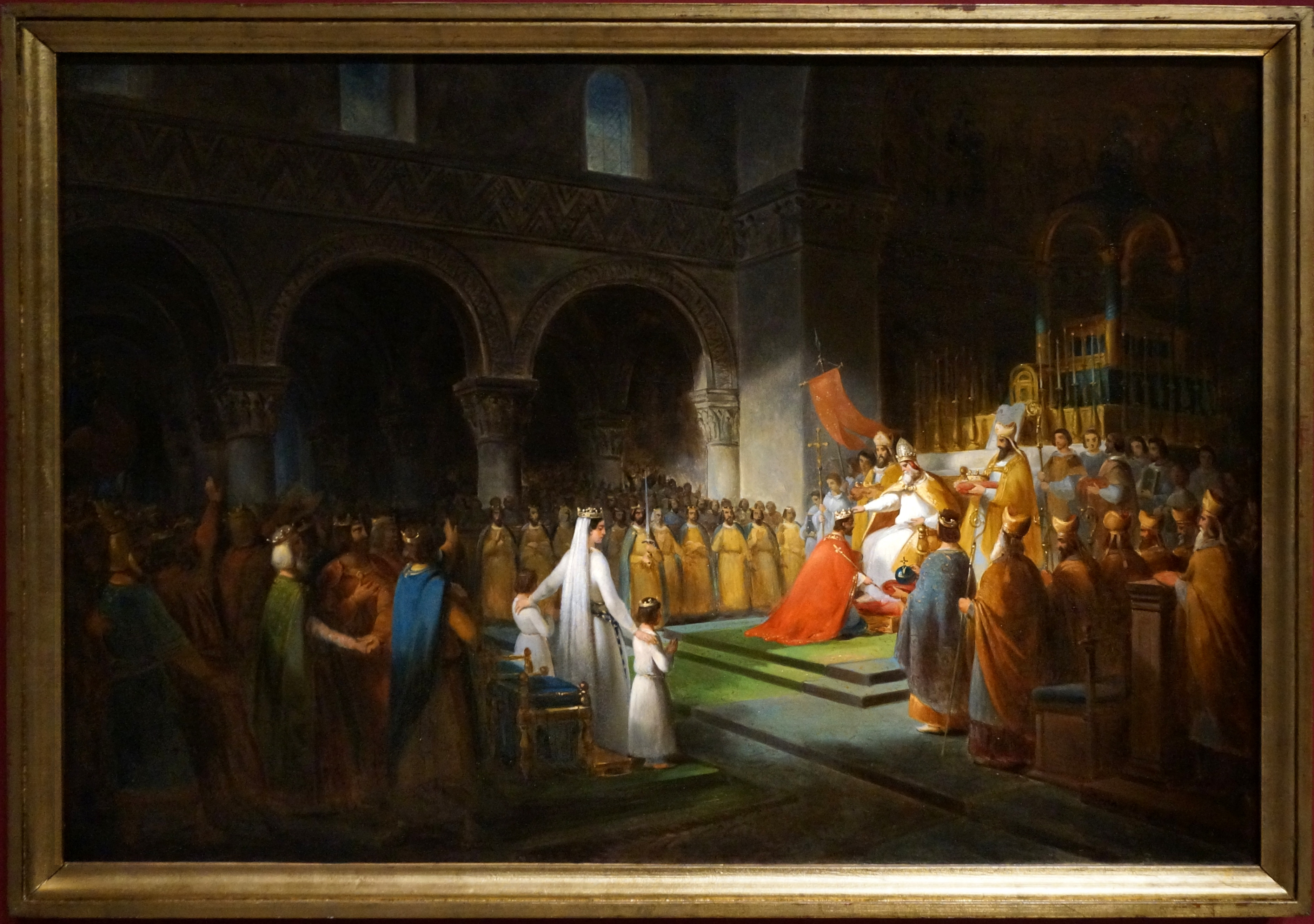 Lors de l' exposition Sacres Royaux, de Louis XIII à Charles.